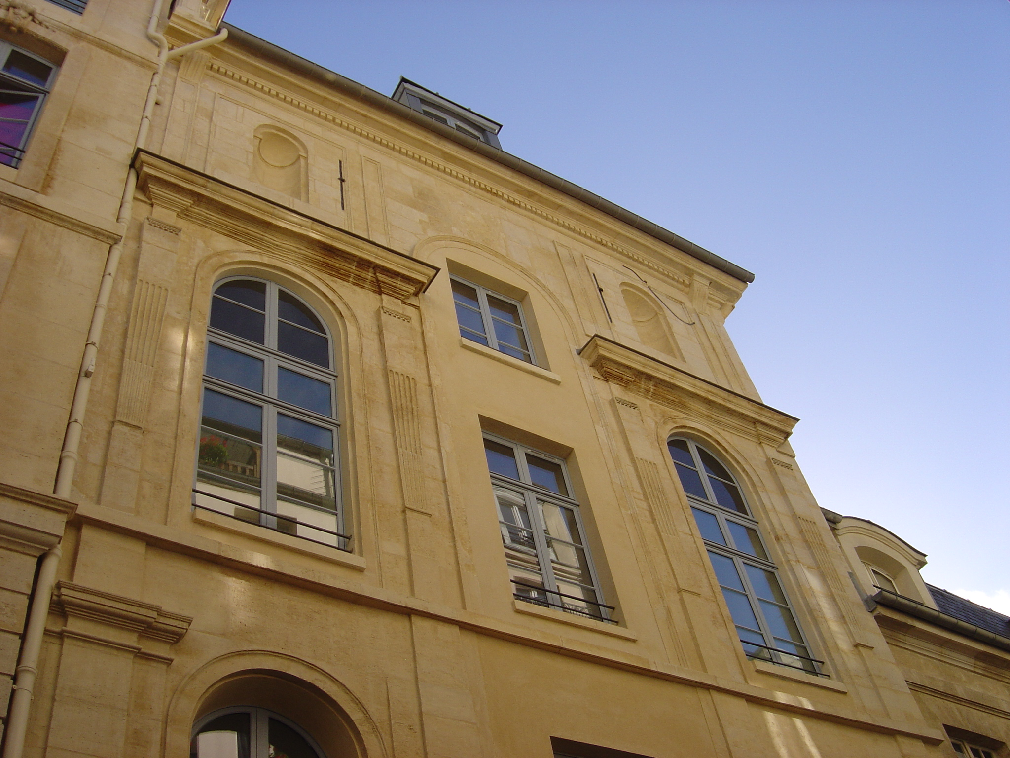 Vestiges de la façade de l'ancienne chapelle Saint-Éloi-des-Orfèvres (1551-1566, architecte : Philibert Delorme) au 9, rue des Orfèvres (Paris I).